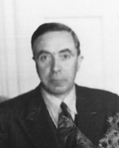 Regjeringsmedlemmene Anders Frihagen, Trygve Lie og Sven Nielsen på Knausen Hotell.